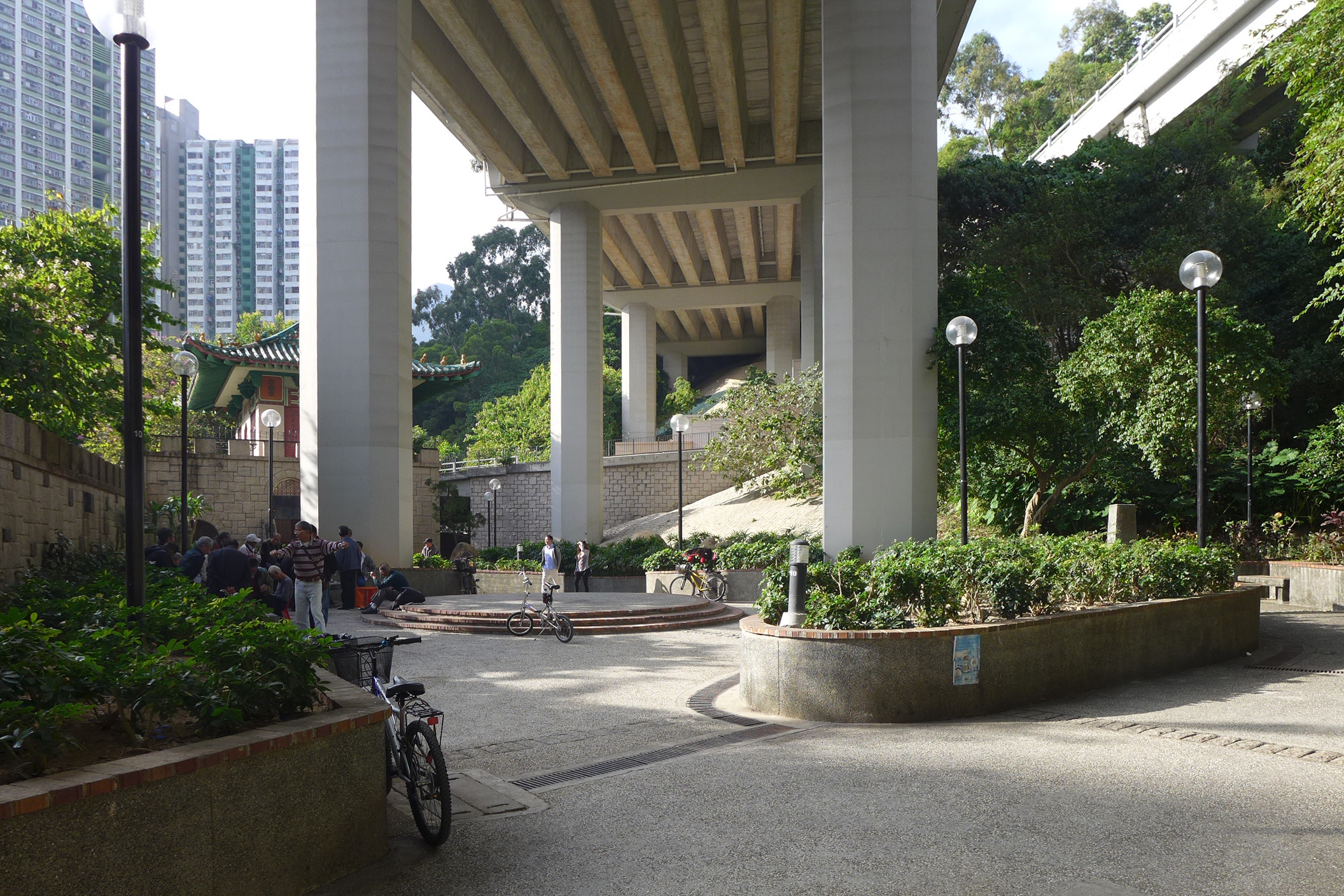 Wai Bun Castle, Tai Wai